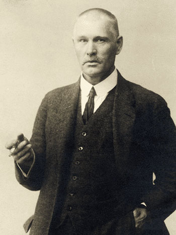 Пекка Халонен, финский художник